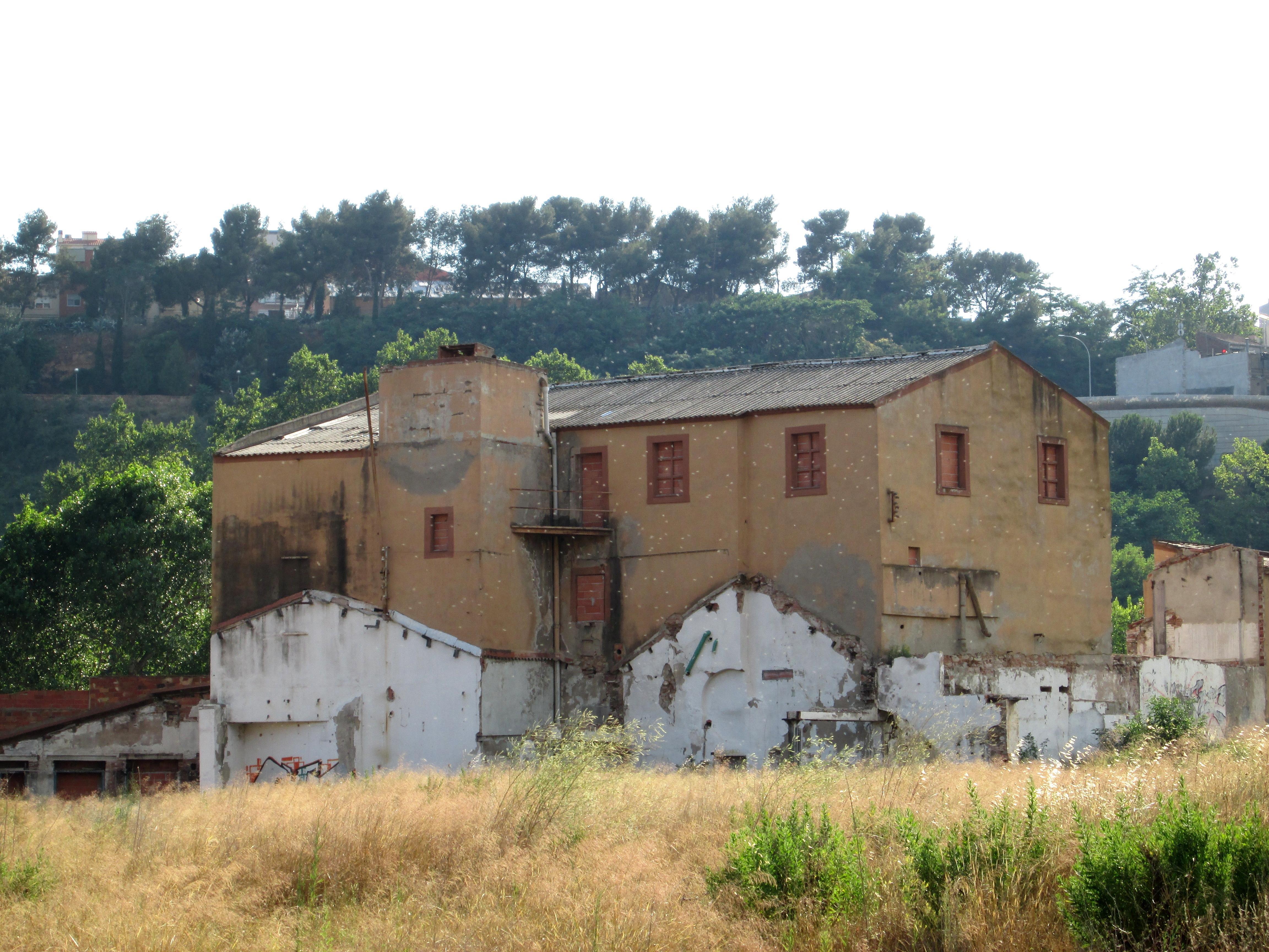 Antiguo molino hidráulico situado en el río Ripoll, en Sabadell, Barcelona (España).